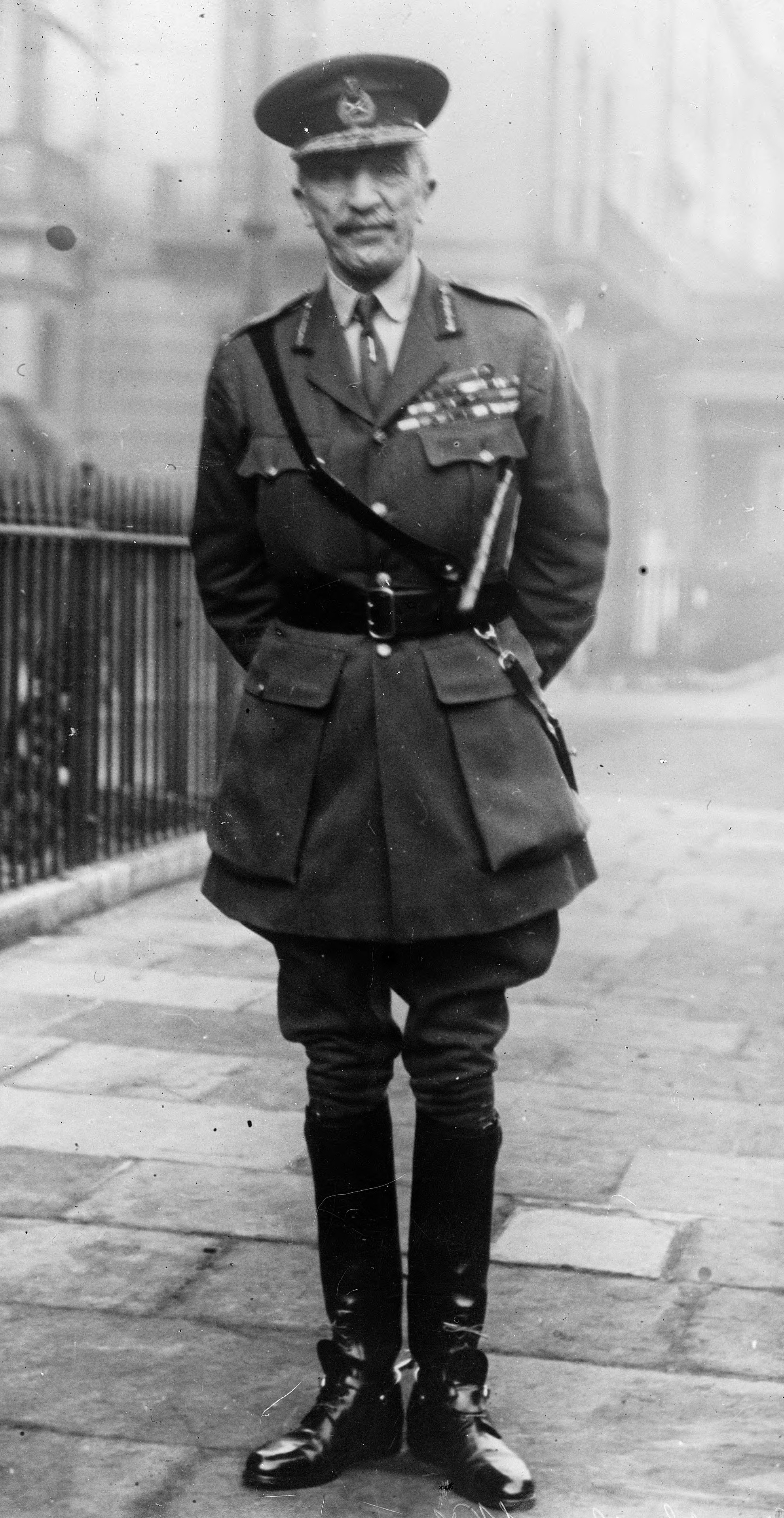 Field Marshal Wilson.